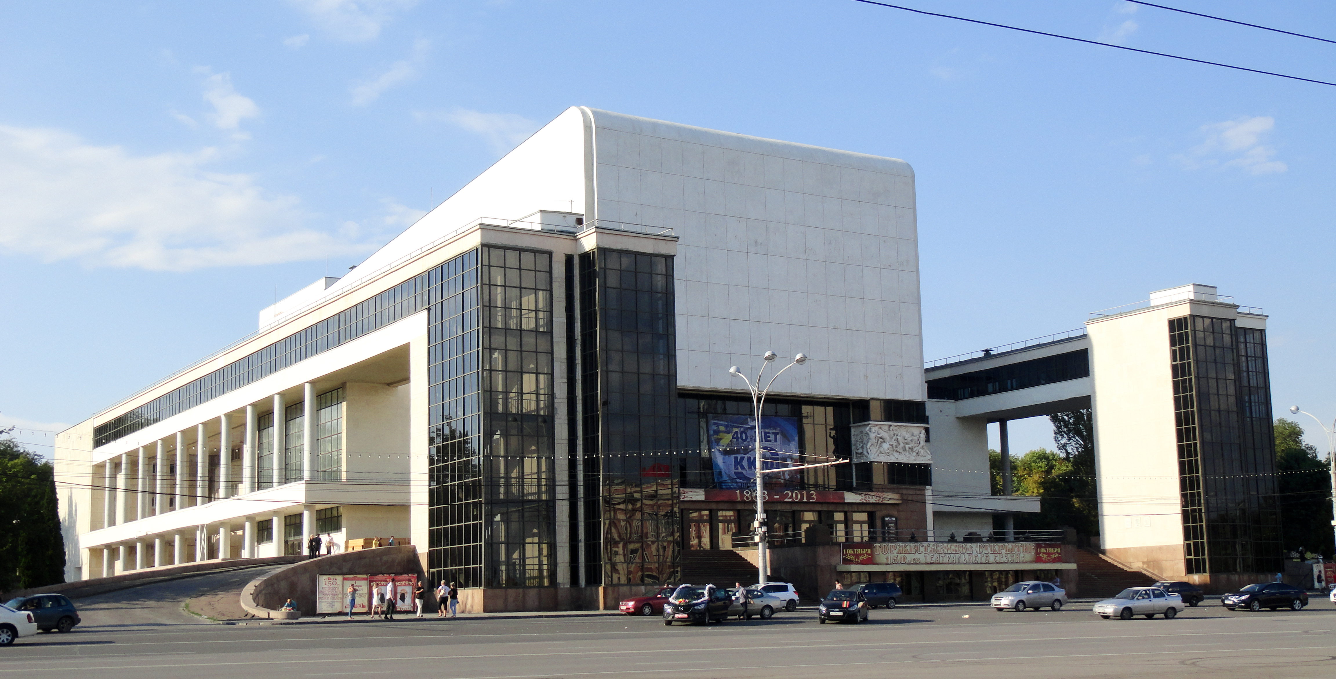 Здание Ростовского Государственного драматического театра им. М. Горького (театр) (Ростовская область, Ростов-на-Дону, Театральная площадь, 1)